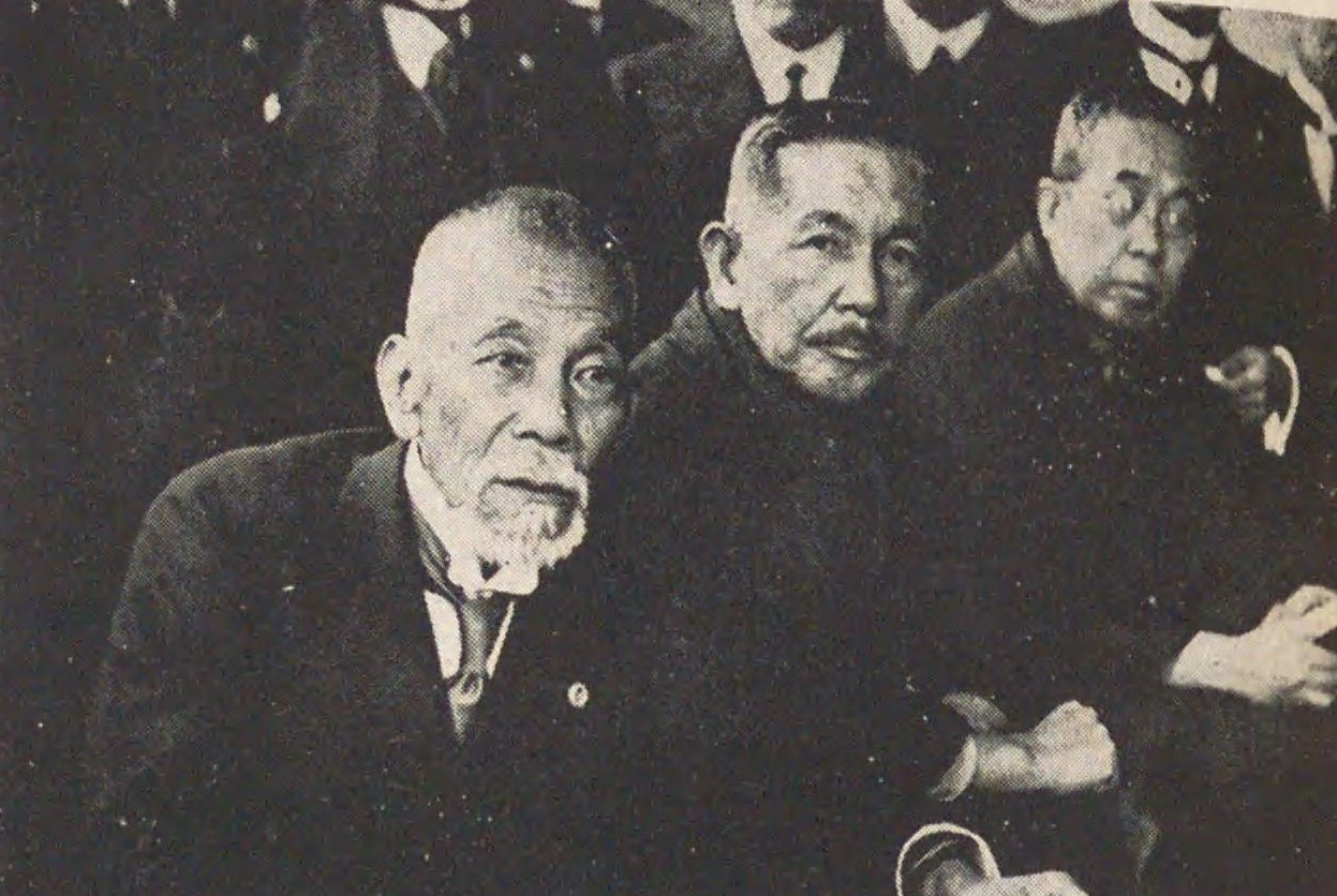 左から、犬養毅、望月圭介、久原房之助